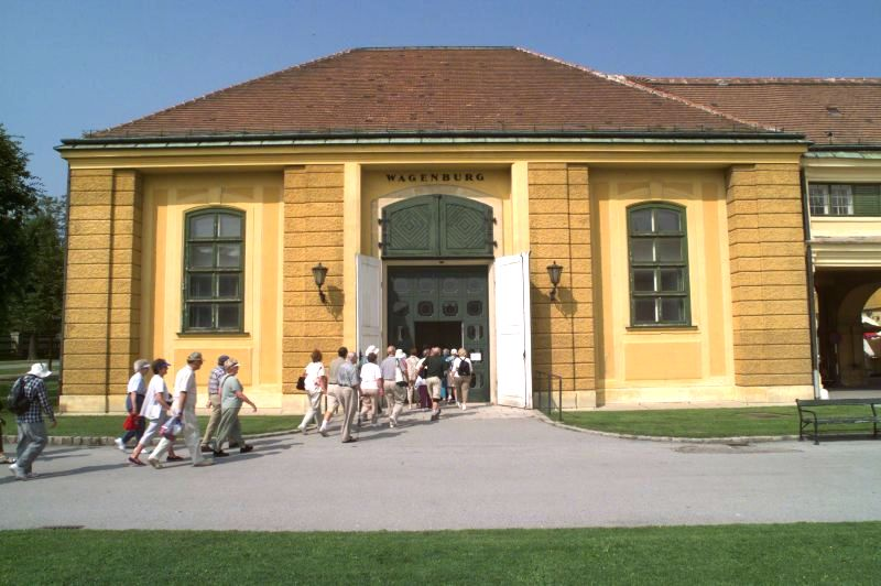 Wagenburg, Ansicht des Eingangsbereiches